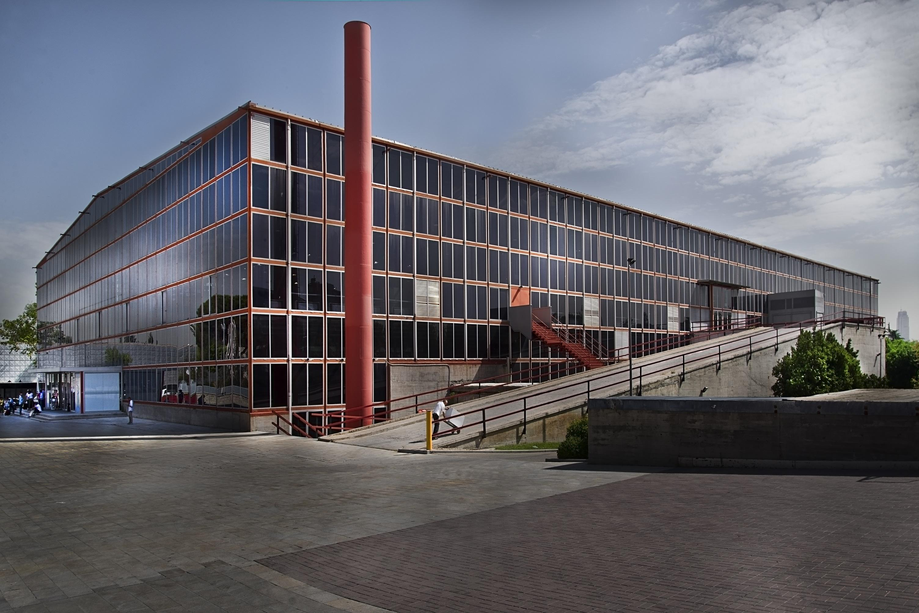 Madrid Destino es una empresa municipal plenamente integrada en el sector económico de reuniones, ferias y congresos. En 2017, se celebraron 434 eventos en las instalaciones que gestiona –un 2% más que en 2016- y participaron más de 1.700.000 personas. Todas sus instalaciones son versátiles y acogen actividades, tanto empresariales como solidarias y ciudadanas.